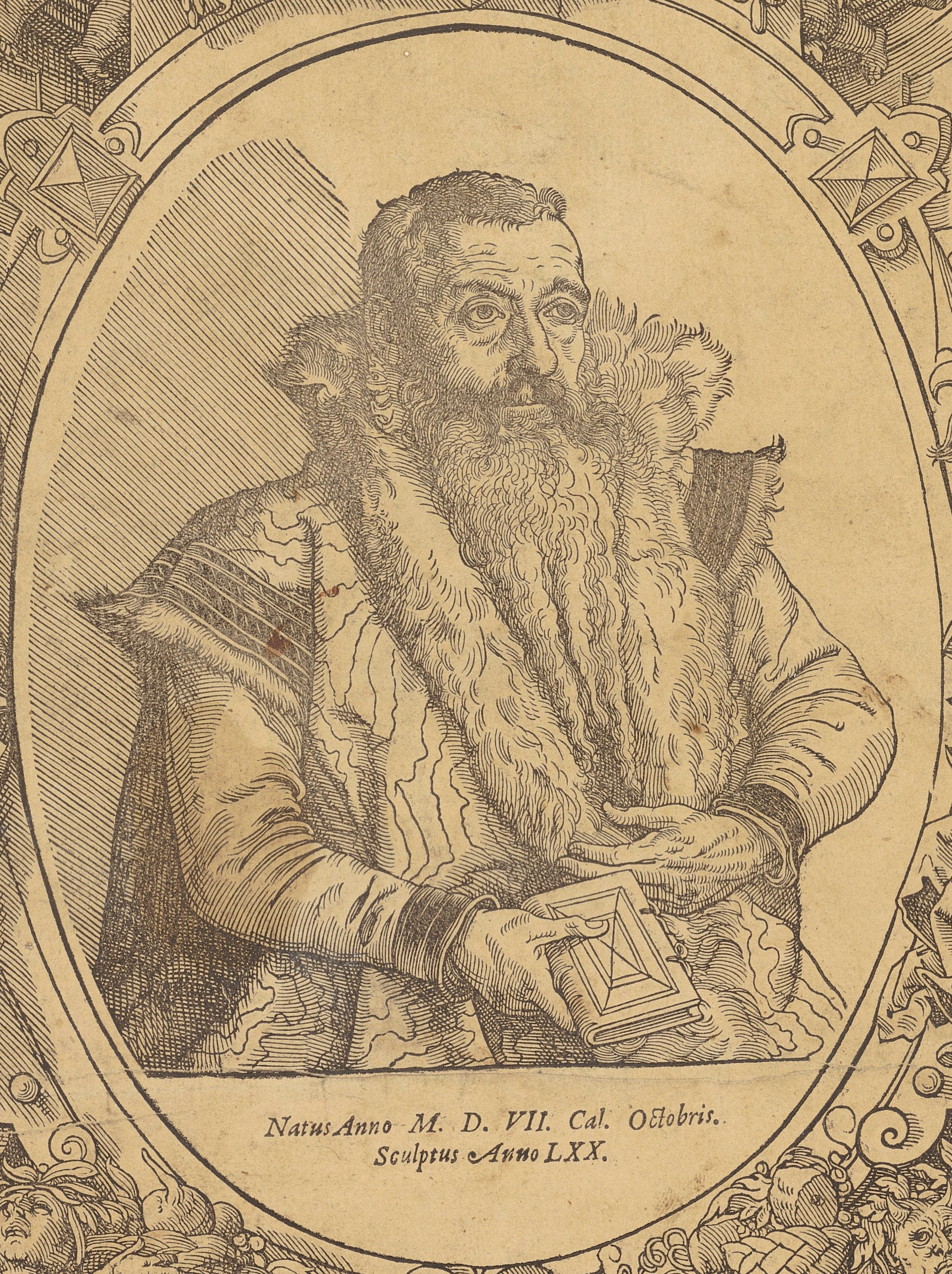 Tobias Stimmer: Porträt von Johannes Sturm, Holzschnitt (Ausschnitt). Erstmals 1570 in Strassburg erschienen, hrsg. von Bernhard Jobin. ETH-Bibliothek Zürich